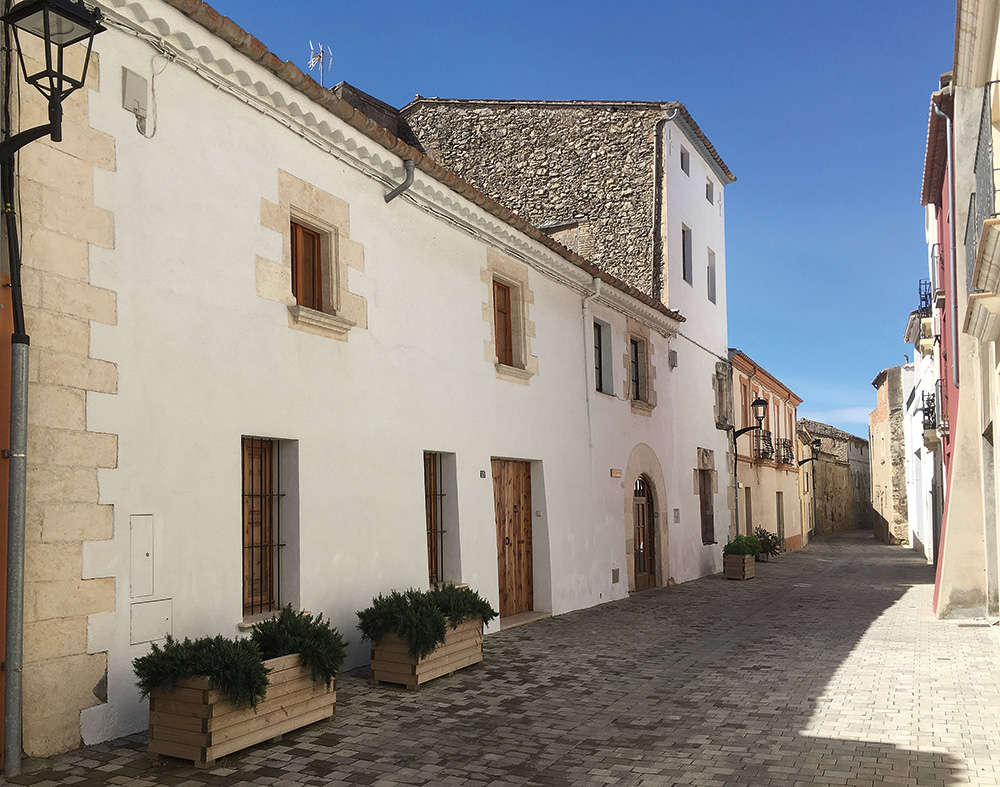 Façana de Cal Cabanyes